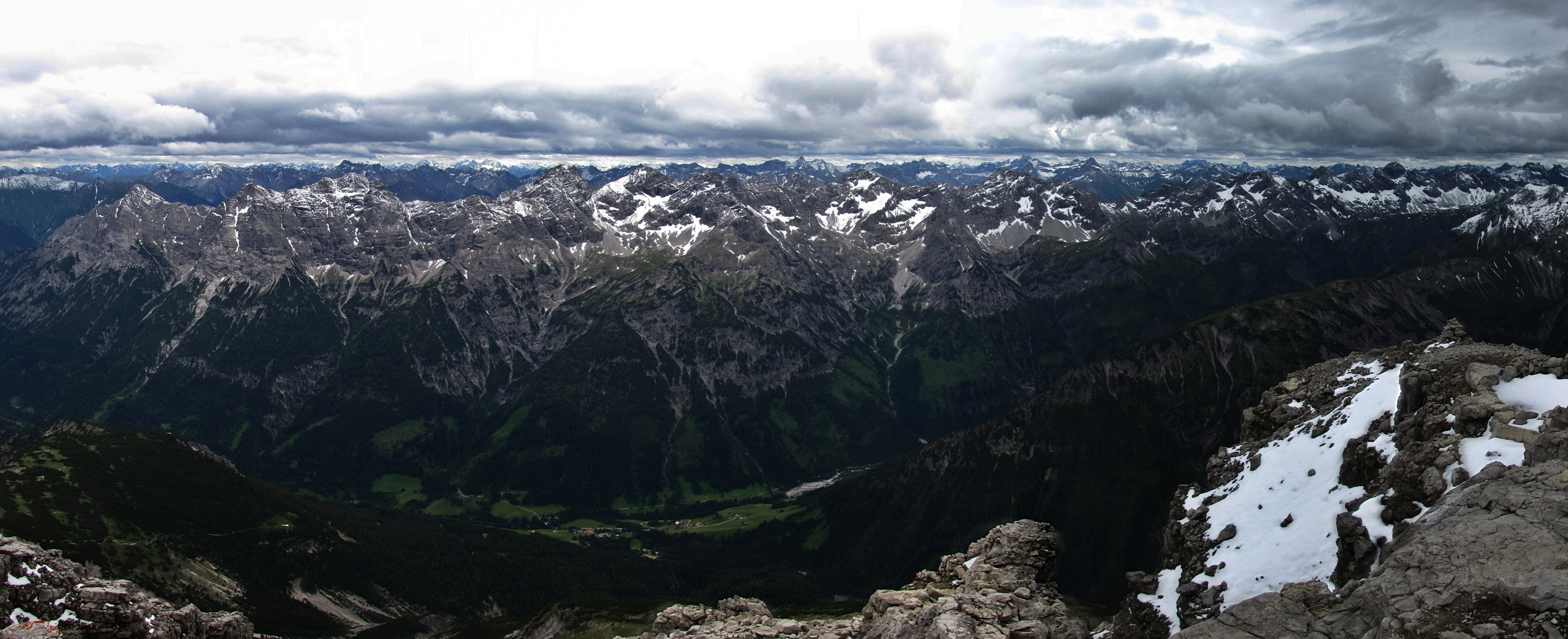 Panorama-Ansicht der Hornbachkette aus Norden vom Gipfel des Hochvogels (2592 m).